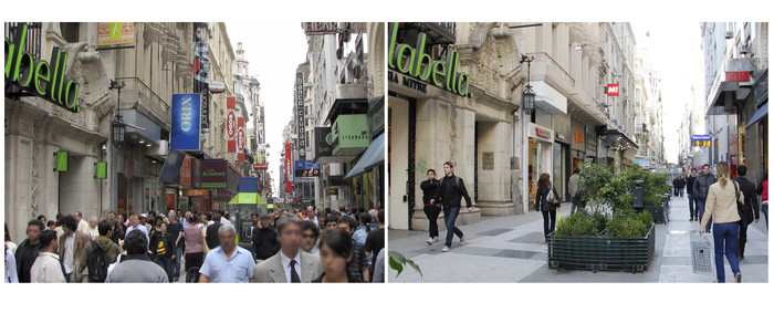 Calle Floridad peatonal de Buenos Aires.